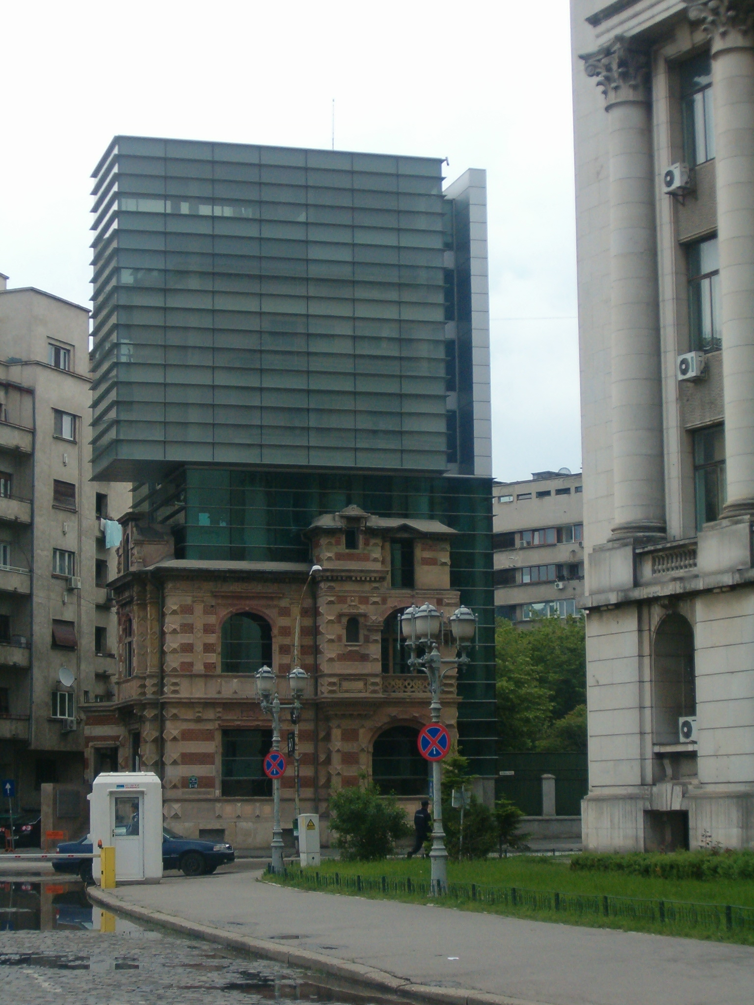 ex Securitate Palace